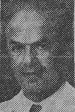 Arkitekten Fred Forbát